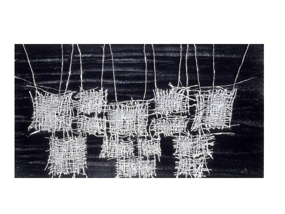 סימפוניה לירושלים